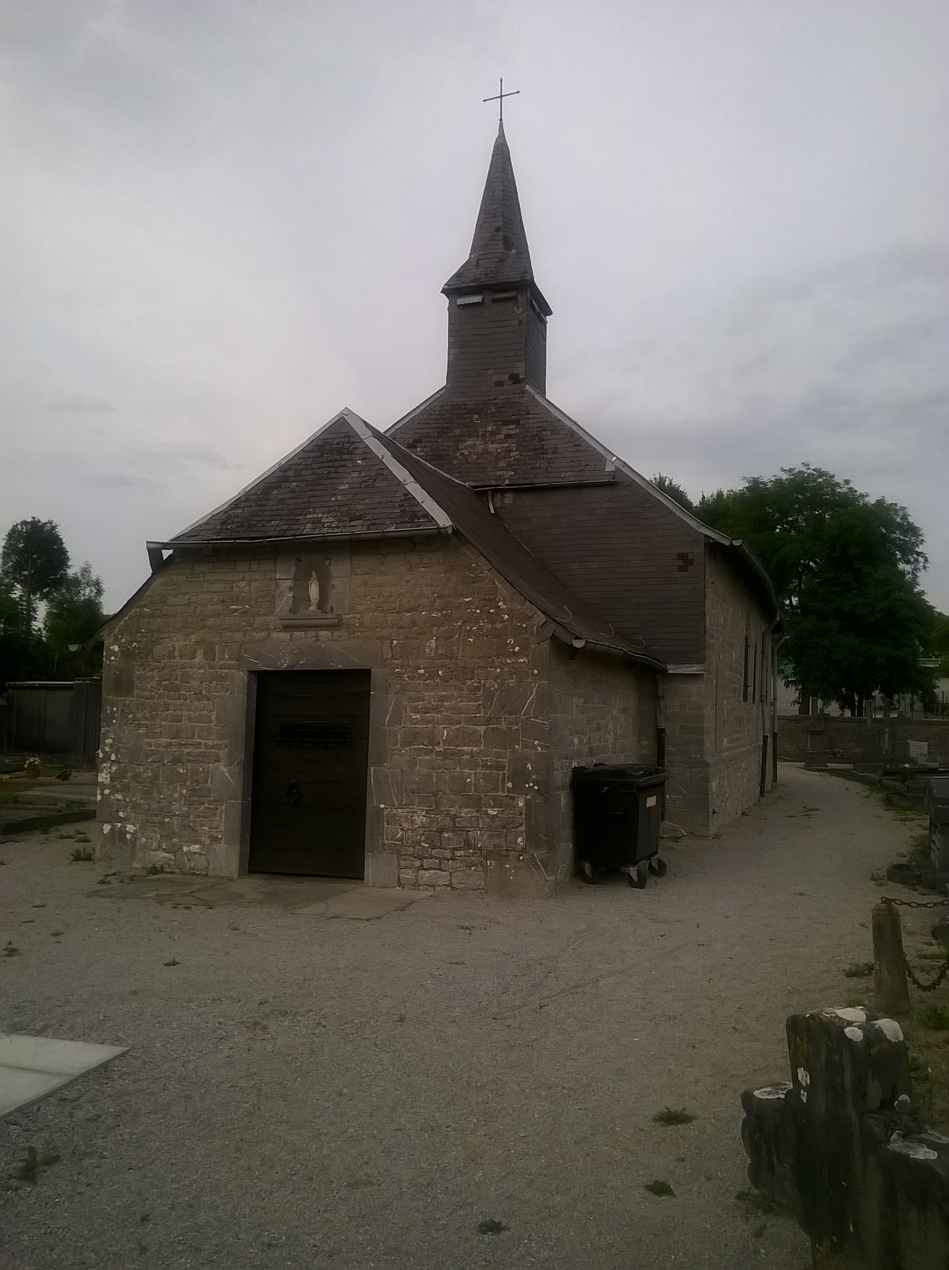 Chapelle Notre Dame de la Brouffe dans le cimetière de Mariembourg.